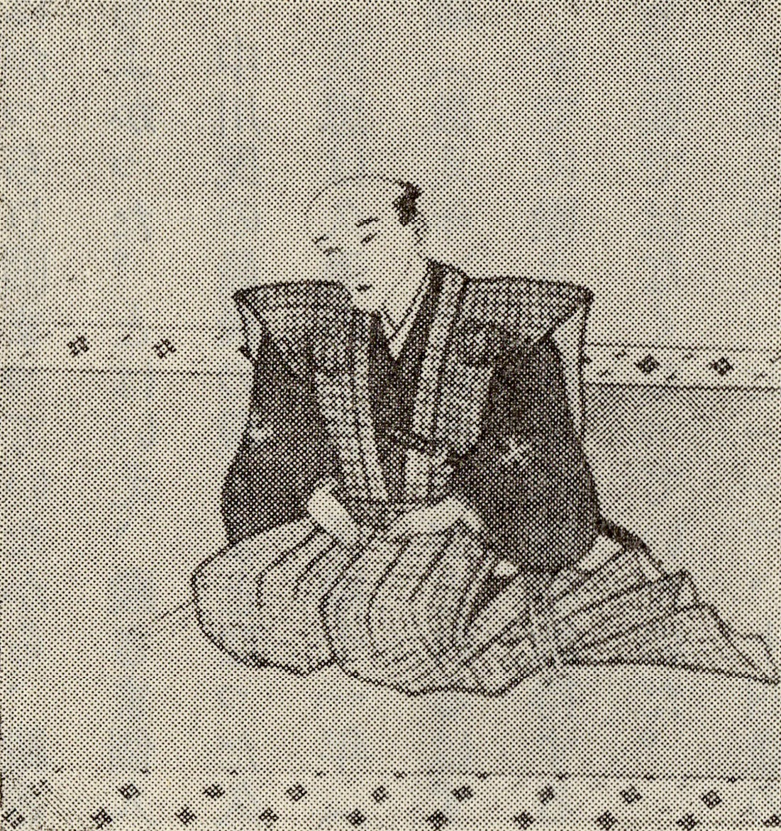 中川久忠の肖像(モノクロ)。